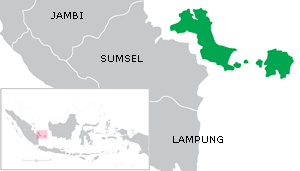 made by for Indonesian wikipedia Licensing Afbeelding:Bangka-BelitungLocatie.png